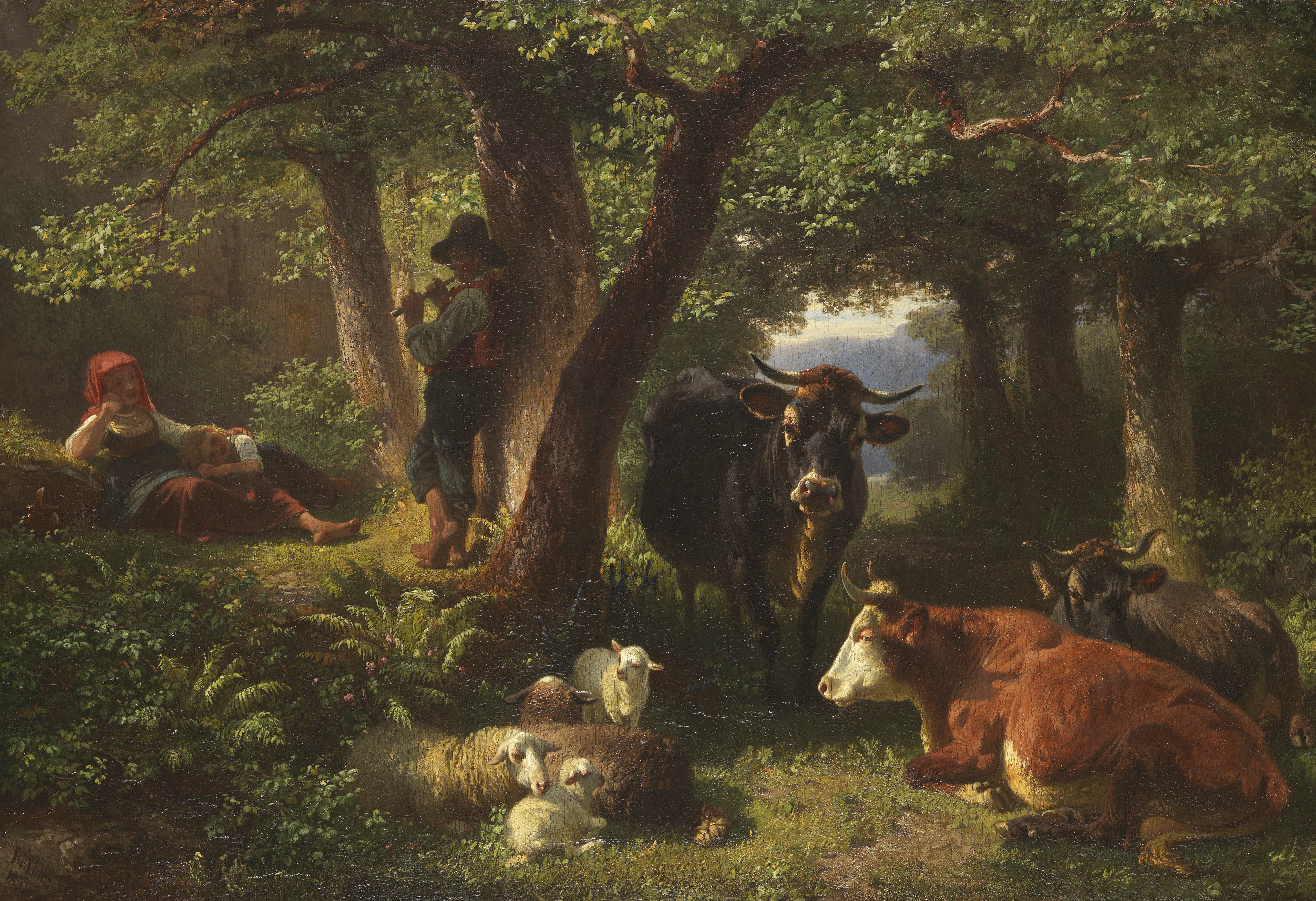 Hirtenkinder im Wald mit Kühen und Schafen. Öl auf Holz. Links unten signiert und schwer leserlich datiert. 48 x 70,5 cm